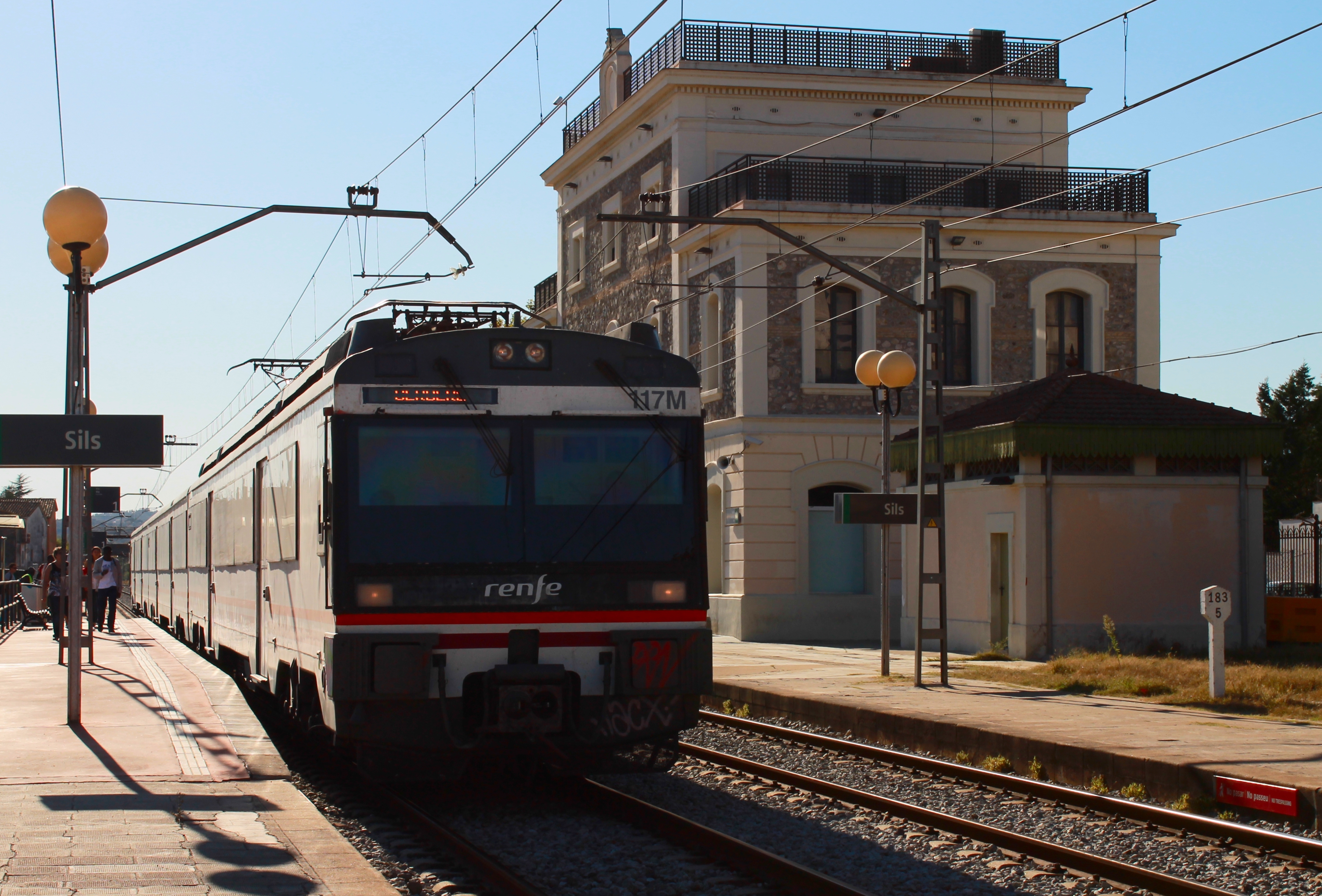 El automotor eléctrico 470-117M de Renfe Operadora en la estación de Sils.